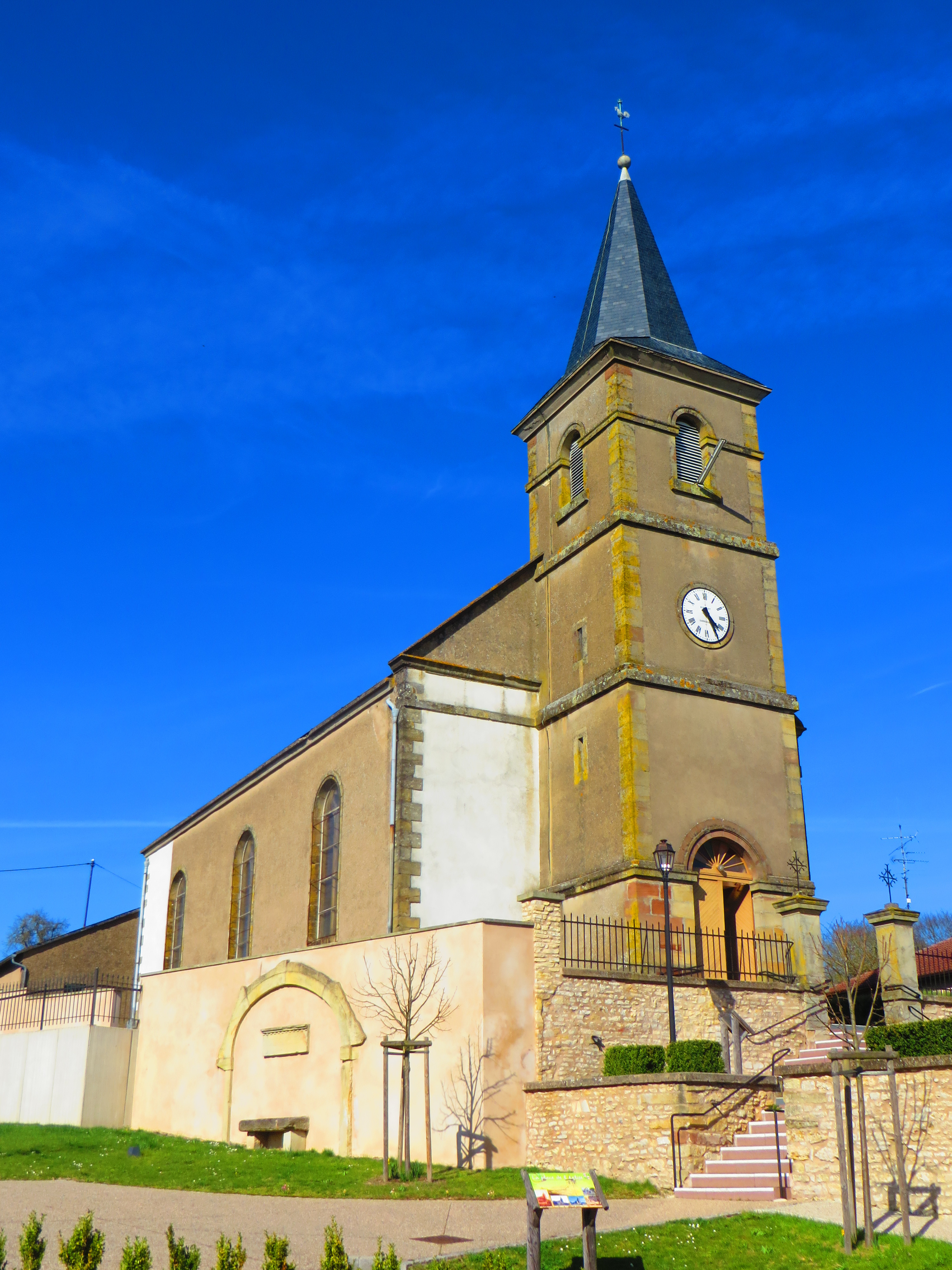 Erstroff Église de l'Exaltation-de-la-Sainte-Croix